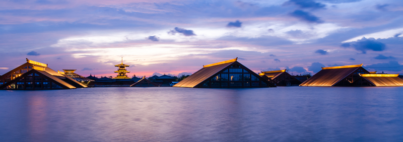 夕阳，松江广富林遗址公园